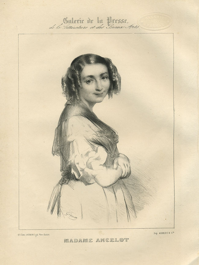 Virginie Ancelot (* 15. März 1792 in Dijon, Dépt. Côte-d'Or; † 21. März 1875 in Paris), französische Schriftstellerin und Malerin